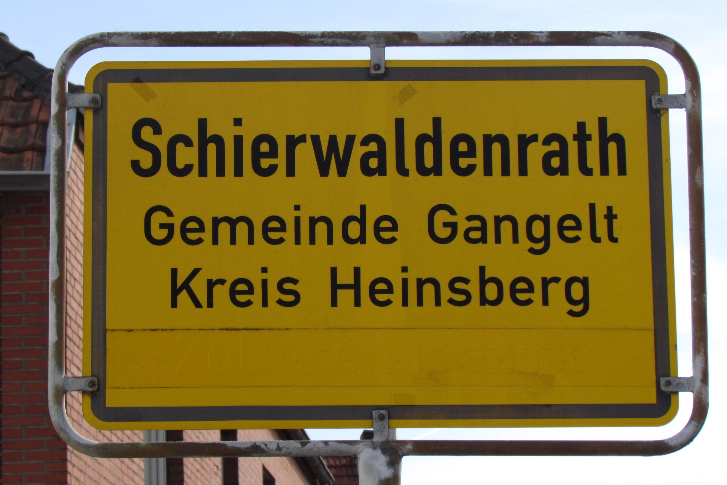 Ortsschild Schierwaldenrath